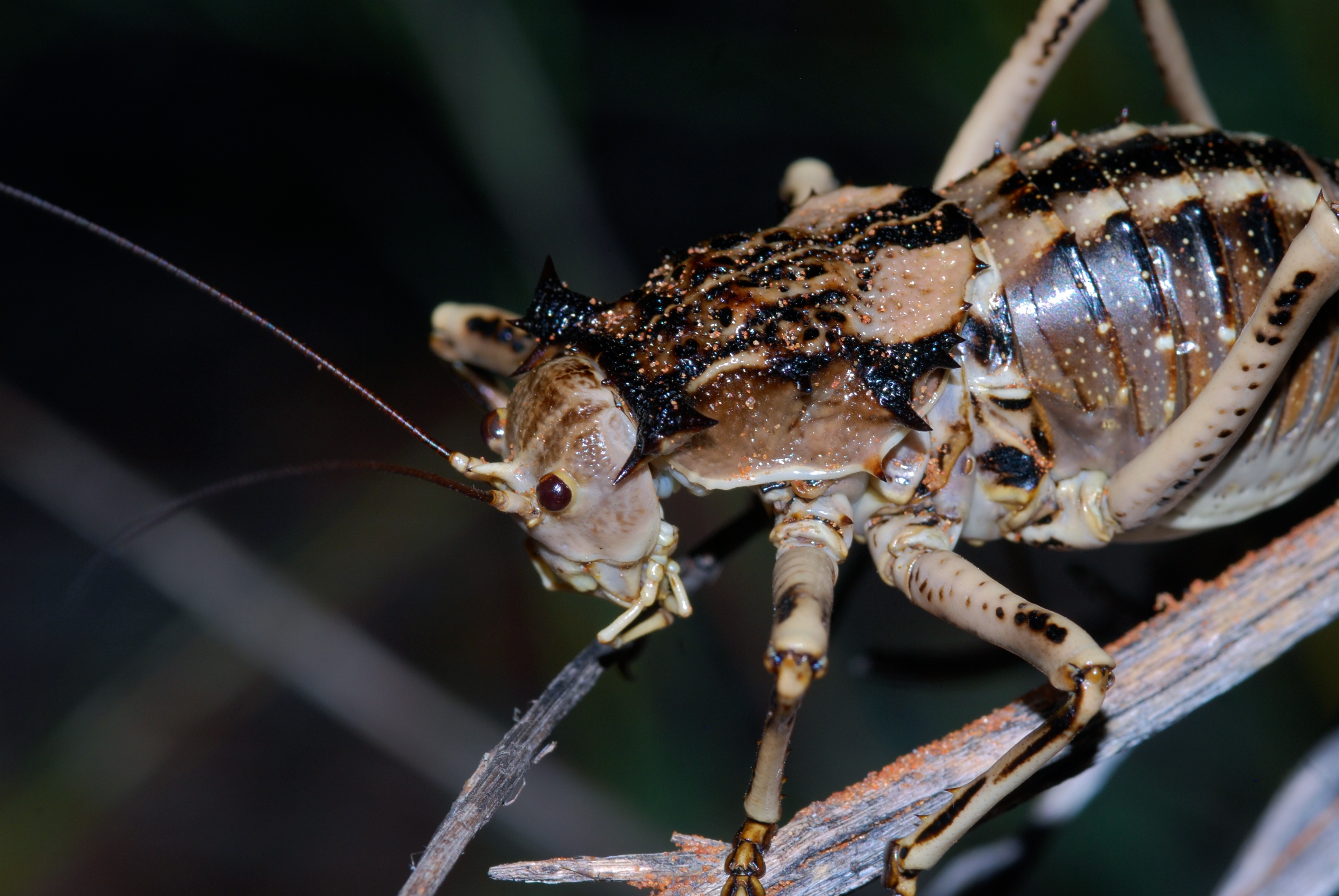 Twee Rivieren Camp, Kgalagadi Transfrontier Park, SOUTH AFRICA